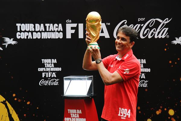 José Roberto Gama de Oliveira, mais conhecido como Bebeto (Salvador, 16 de Fevereiro de 1964), é um ex-futebolista brasileiro que atuava como atacante. Em Brasília, no tour da taça da Copa do Mundo 2014 pelo Brasil.